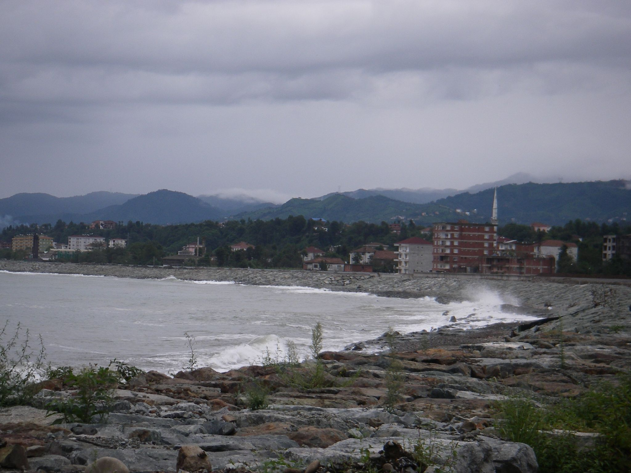 Mer Noire entre Rize et Hopa